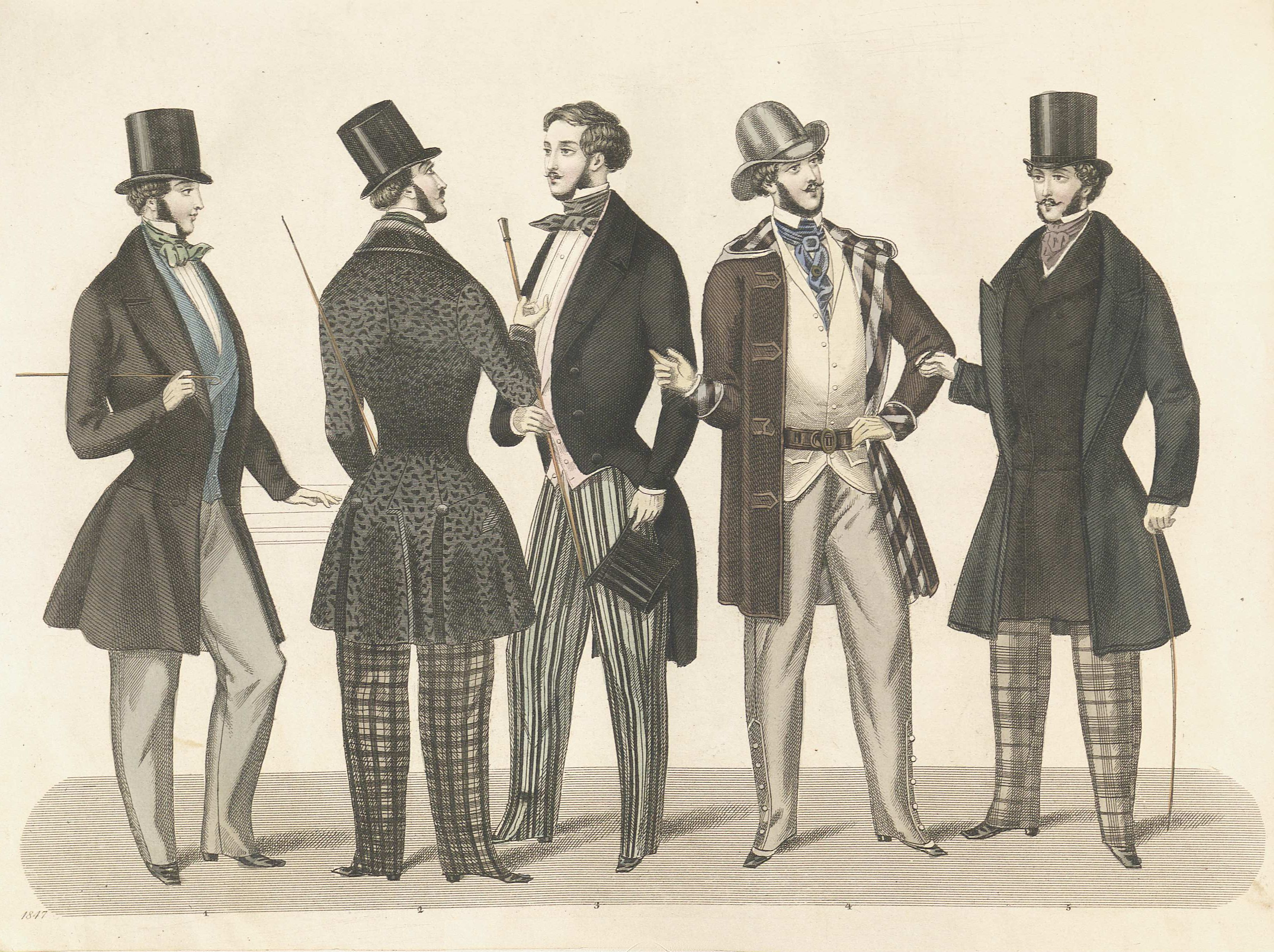 Hatt; Rock; Halsduk; Väst; Byxor; Frack; Käpp; Bälte